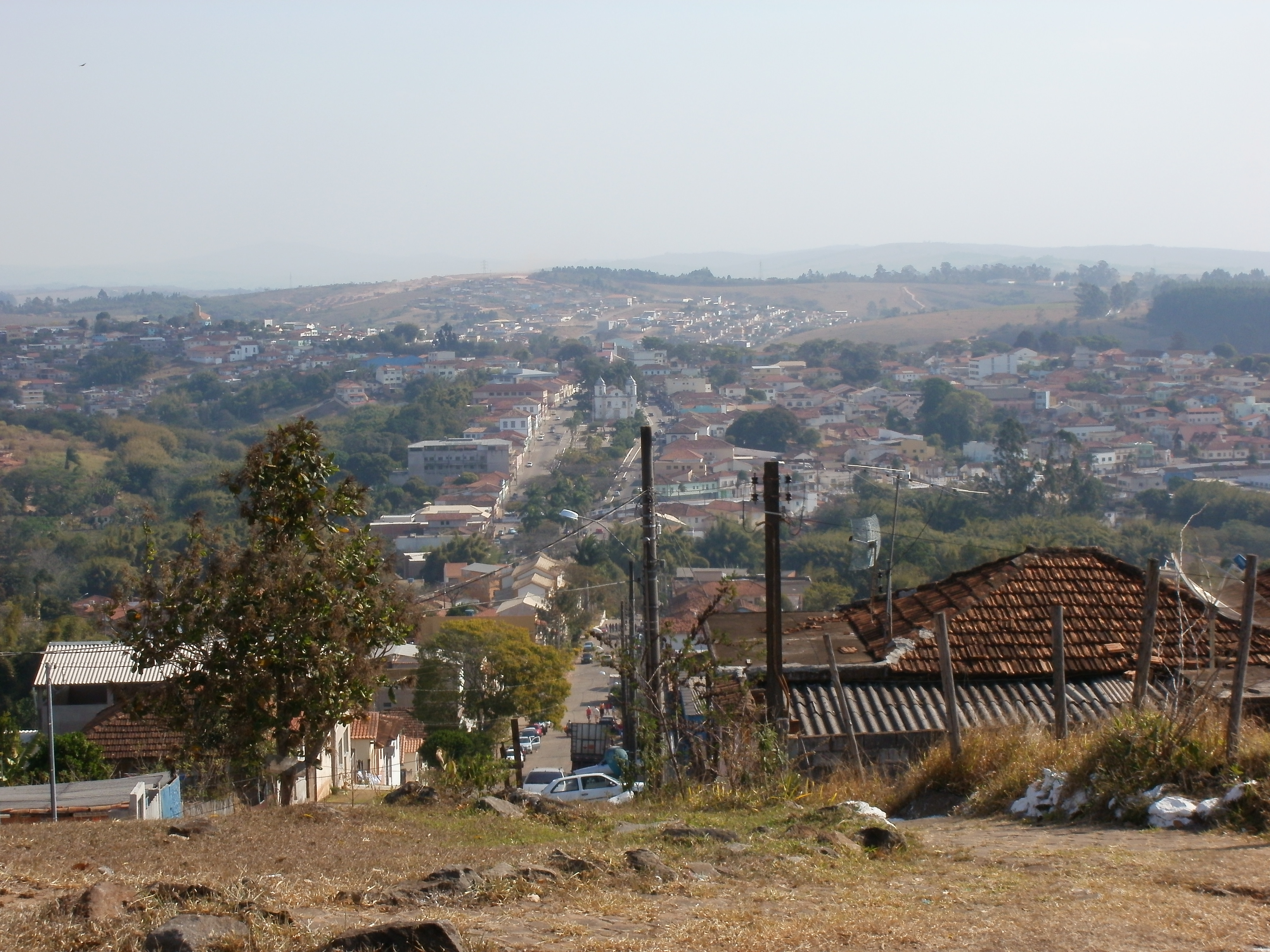 Vista panorâmica da cidade mineira de Andrelândia-MG.